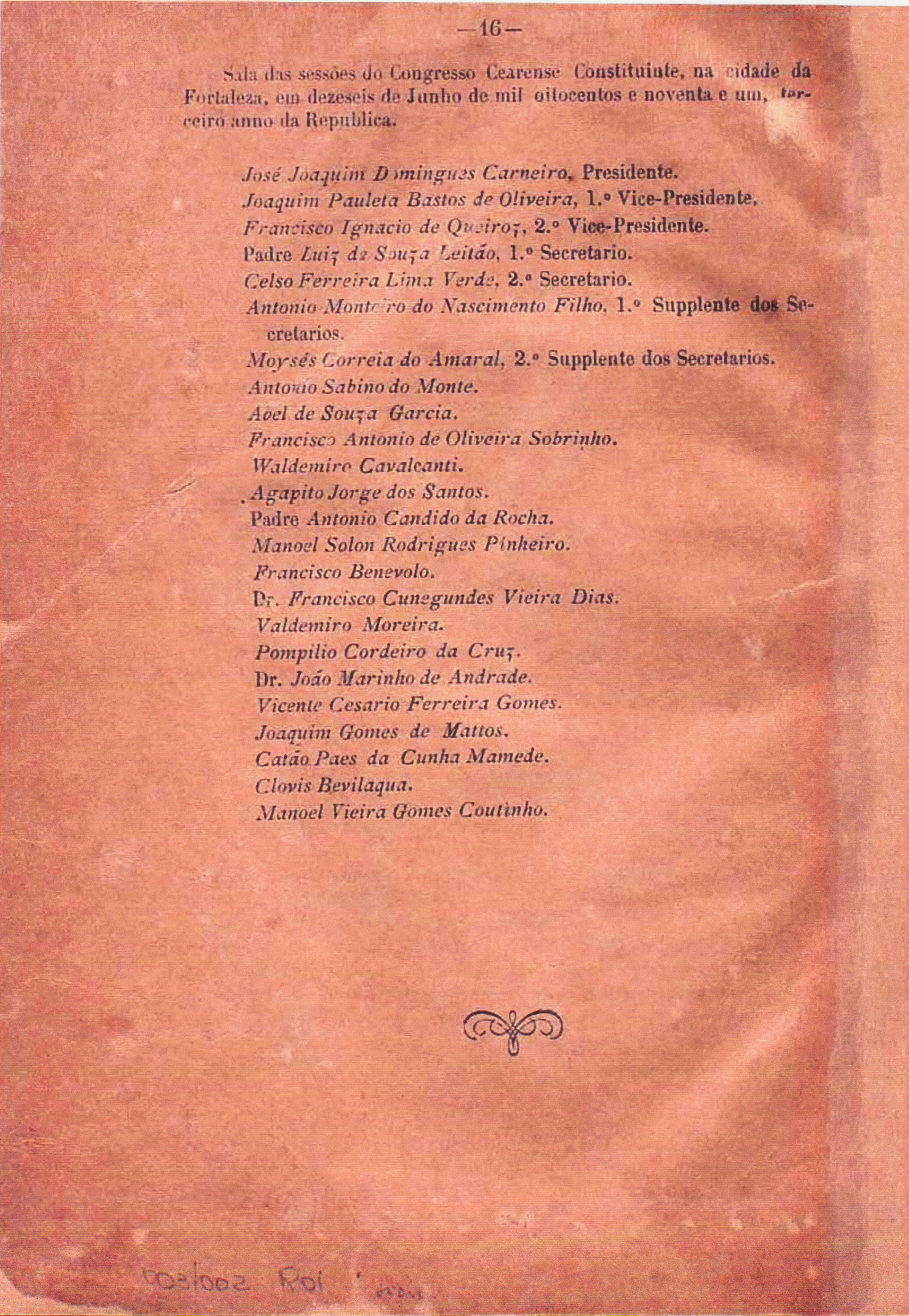 Página com a relação de constituintes que assinaram a Constituição Política do estado do Ceará de 1891.